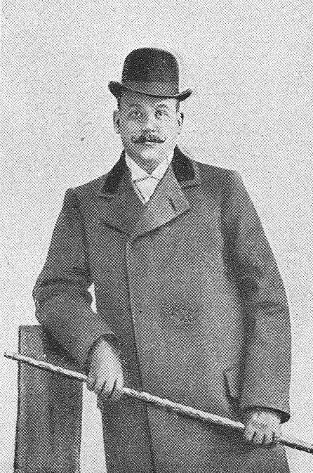 Herbert Osbaldeston Duncan, brit. Radsportler und späterer Journalist. 1897